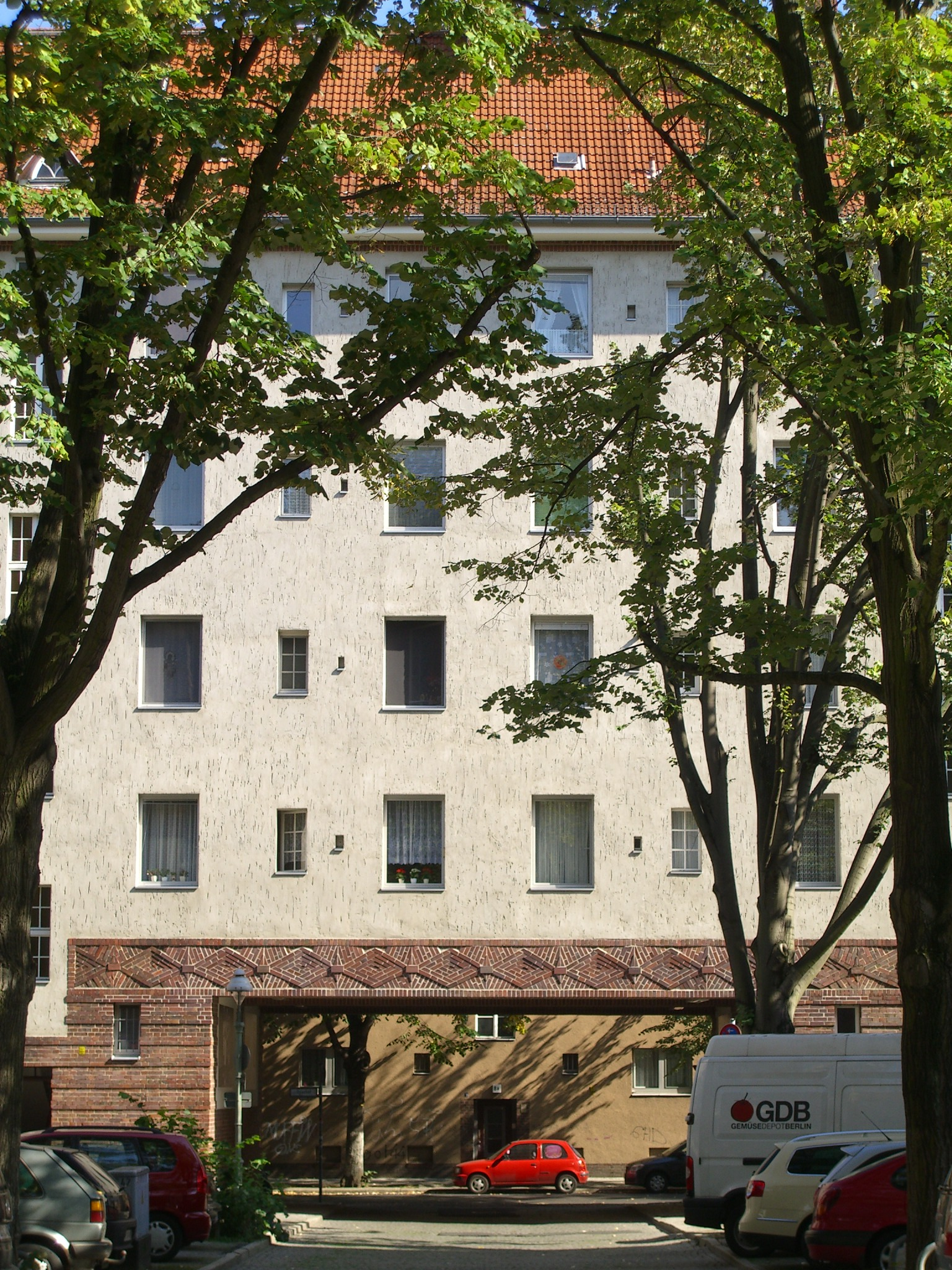 Ilsenhof 1-10, Wohnanlage, 1928-29, Toreinfahrt vom Hof aus gesehen.